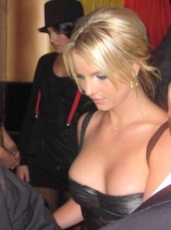 Britney Spears en Nueva York